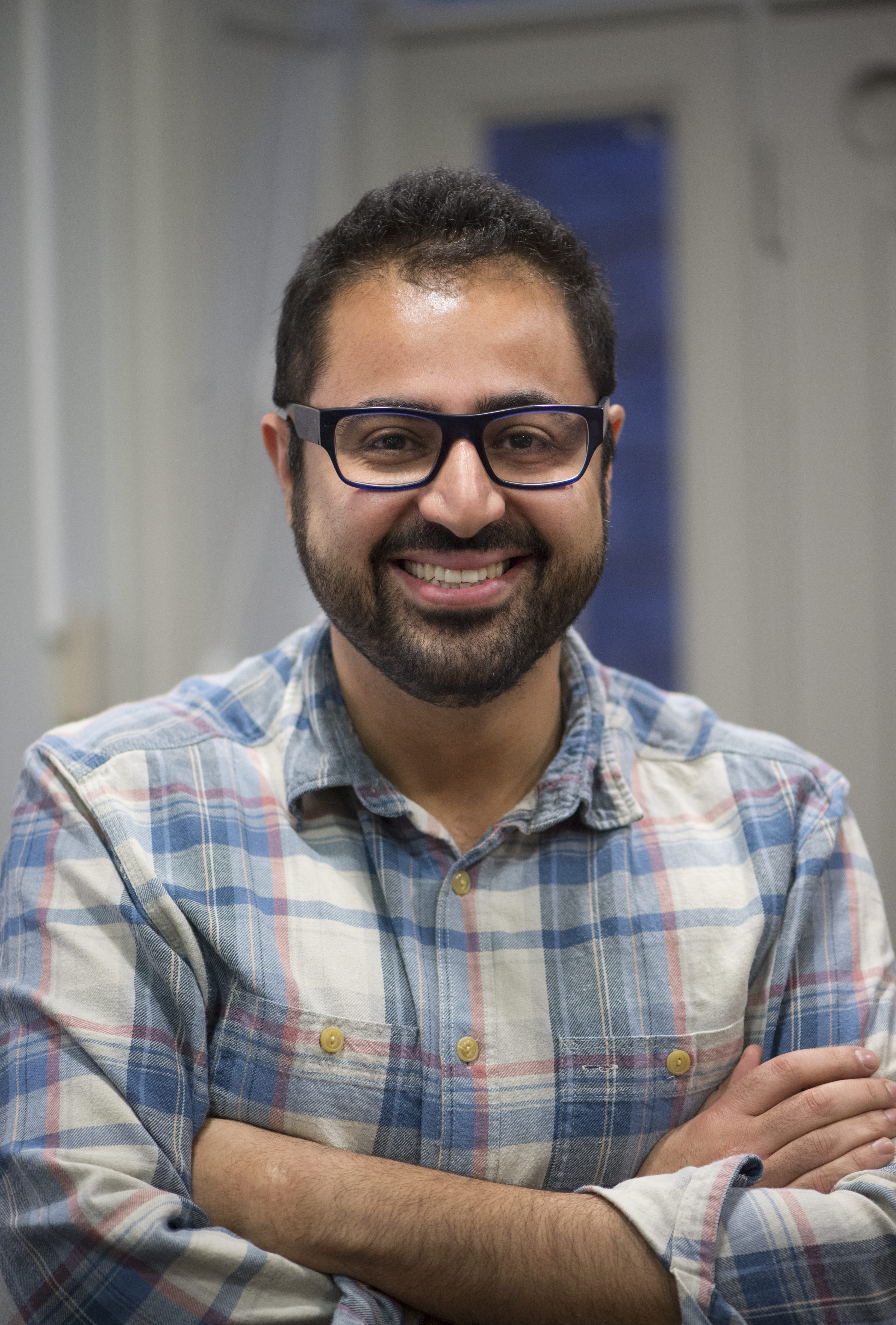 Amir Kheirmand